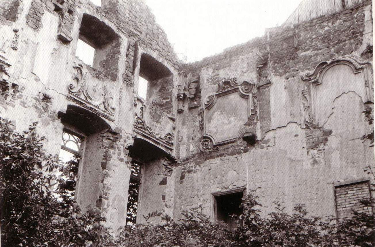 Hundisburg, castle, ruin